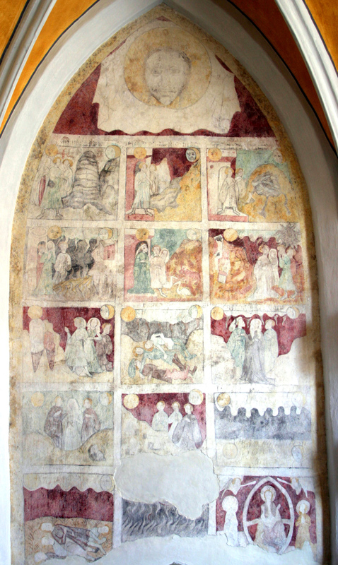 Erst vor wenigen Jahren wurde in der Spitalkirche die sehr selten Darstellung der 15 Zeichen vor dem jüngsten Gericht freigelegt.